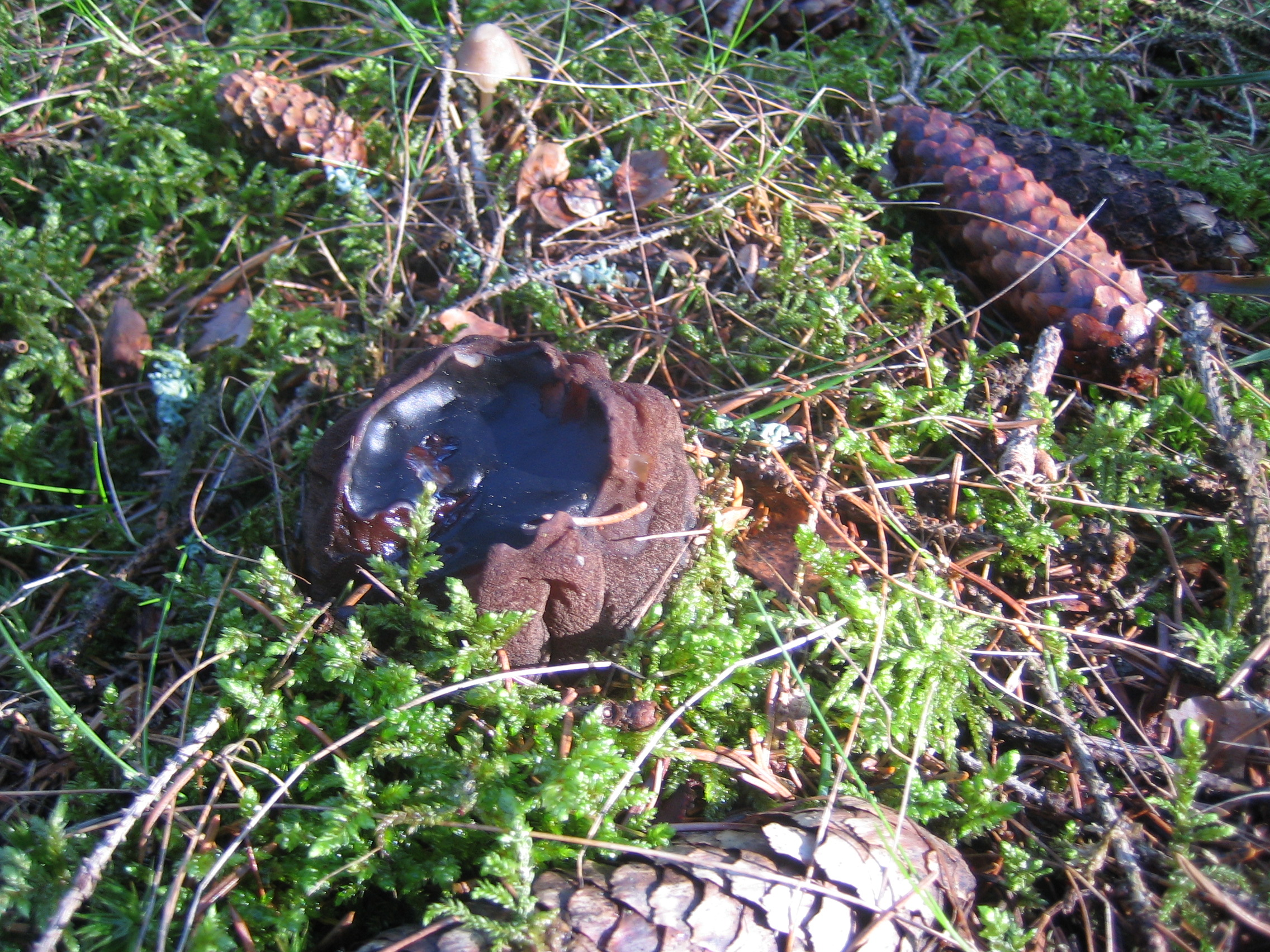 Sarcosoma globosum in Fageruddsåsen, Enköping, Sweden